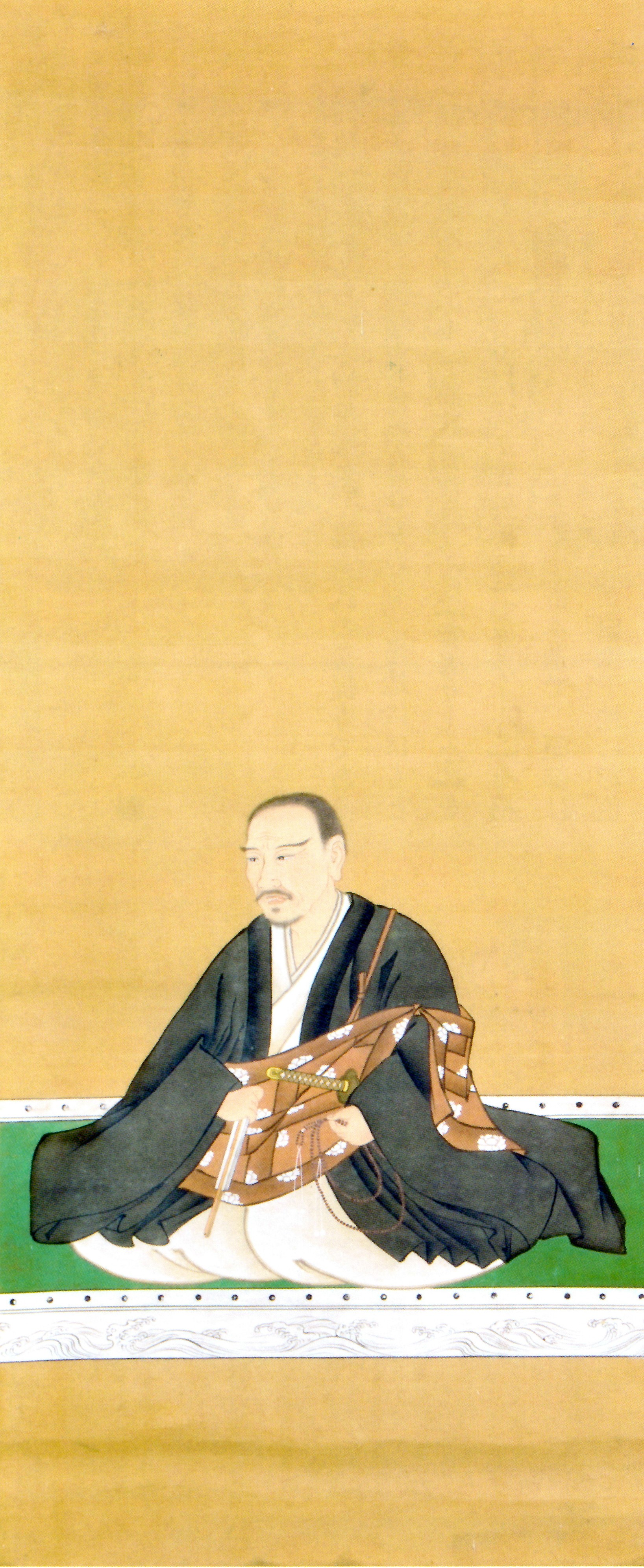 湯河直光の肖像。